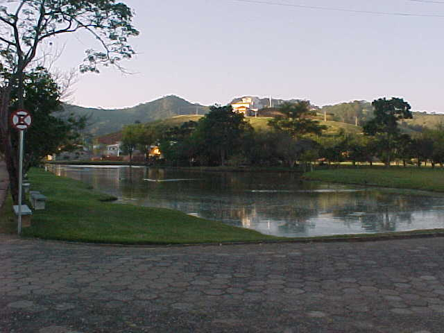 Lago da Universidade Federal de Itajubá